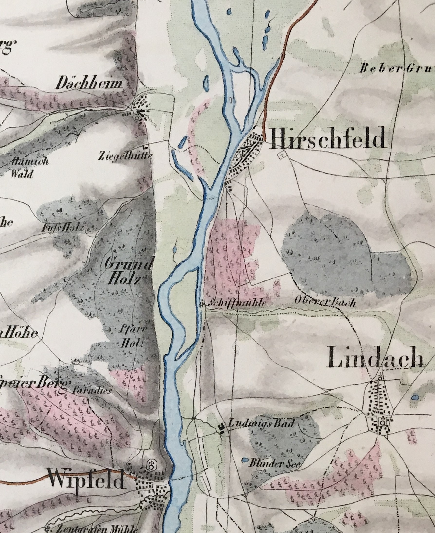 Kolorierte Karte mit den Orten Hirschfeld, Lindach und Wipfeld vor dem Befall der Reblaus (Undatiert, frühes 19. Jahrhundert). Die Reblagen sind rot eingezeichnet.